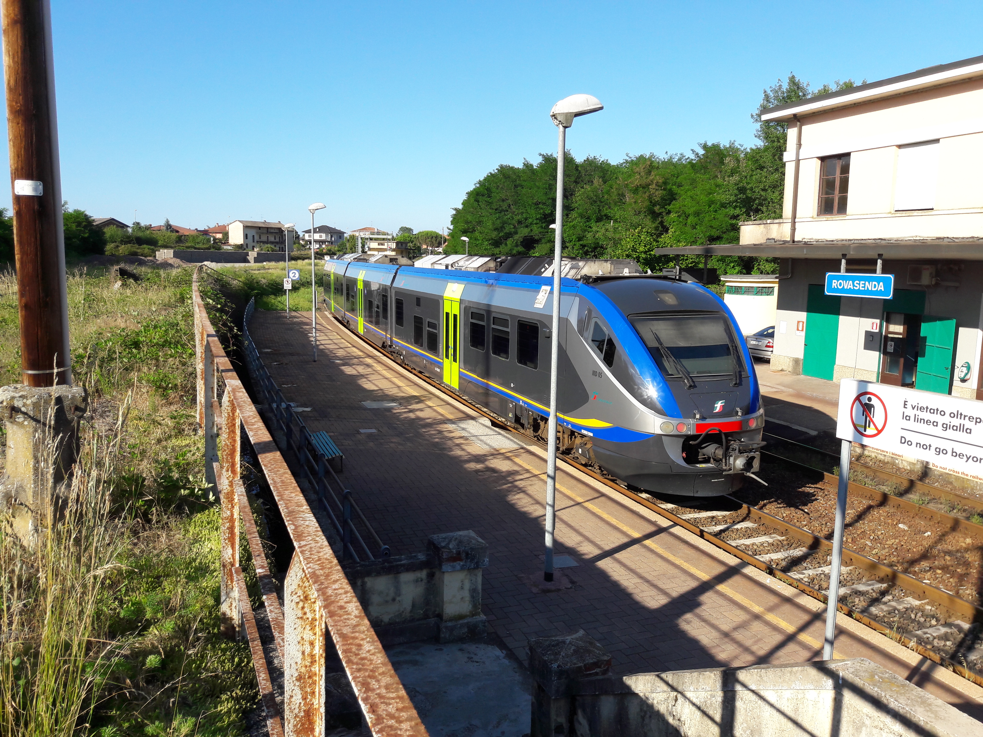 Regionale 4825 in partenza dal binario 2 della stazione di Rovasenda per Novara, effettuato da un Minuetto nella nuova livrea DTR (Divisione Trasporto Regionale) di Trenitalia.